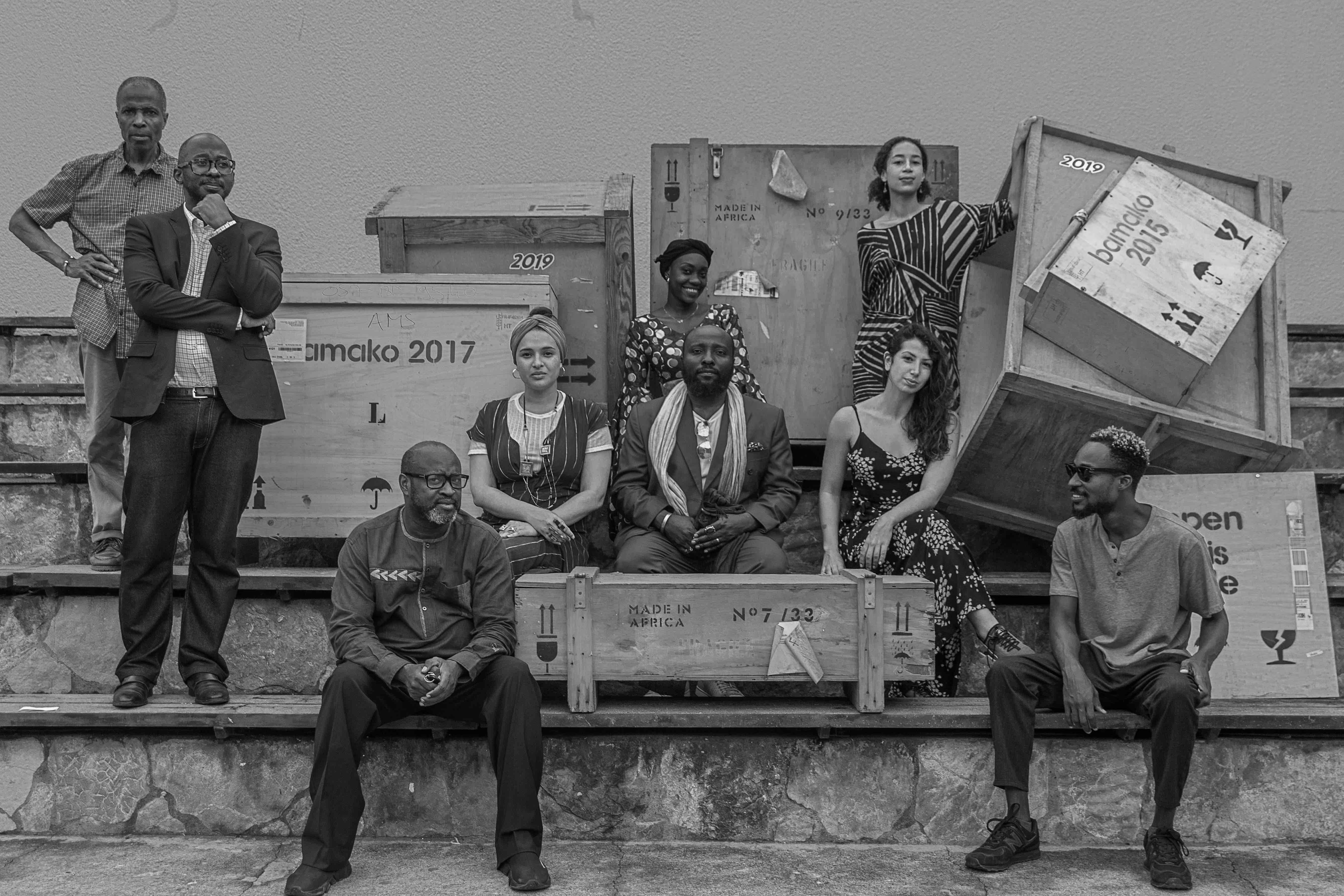 image pour illustrer la biennale de la photographie au Mali